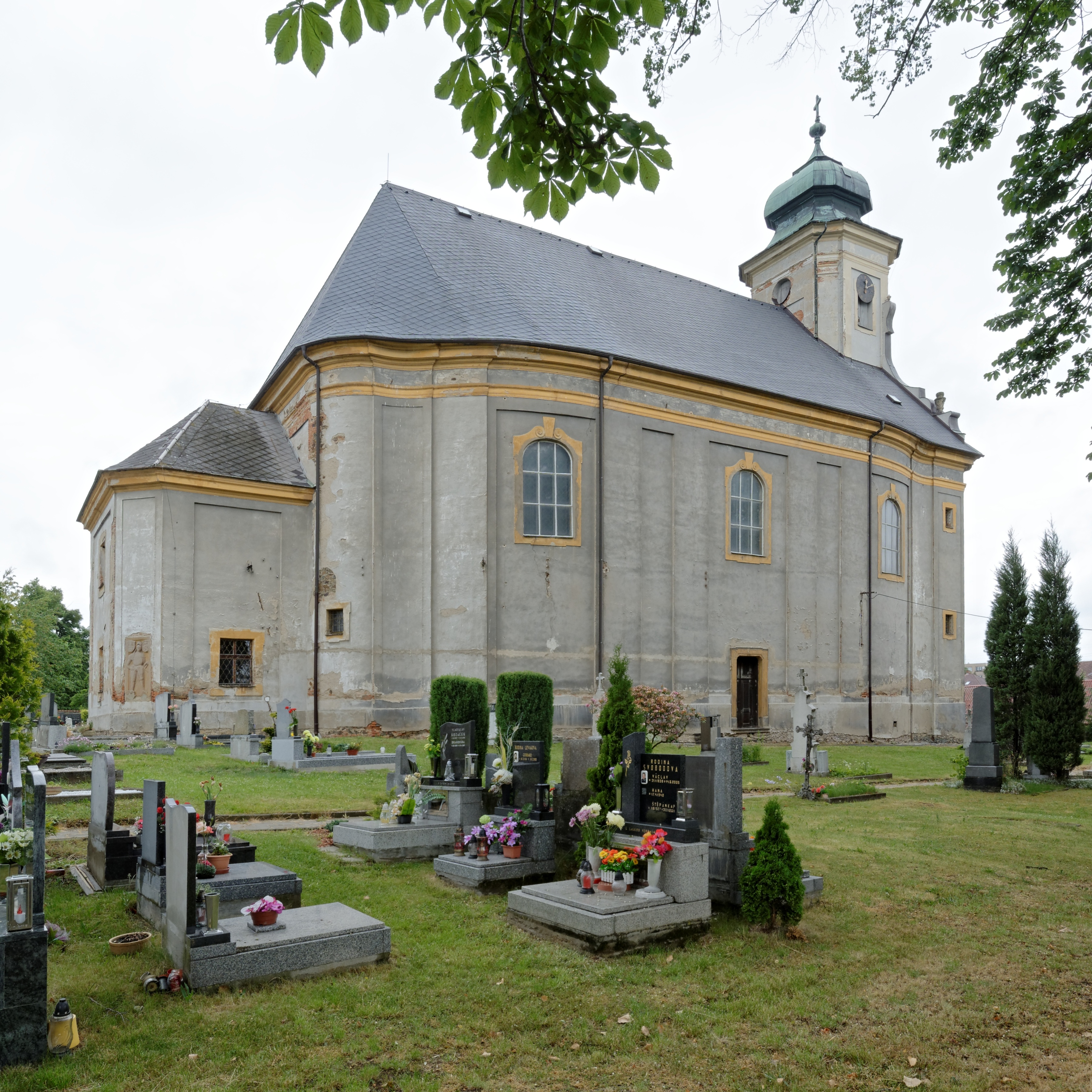 Kostel Neposkvrněného Početí Panny Marie, Velké Heraltice. Pohled od jihu.